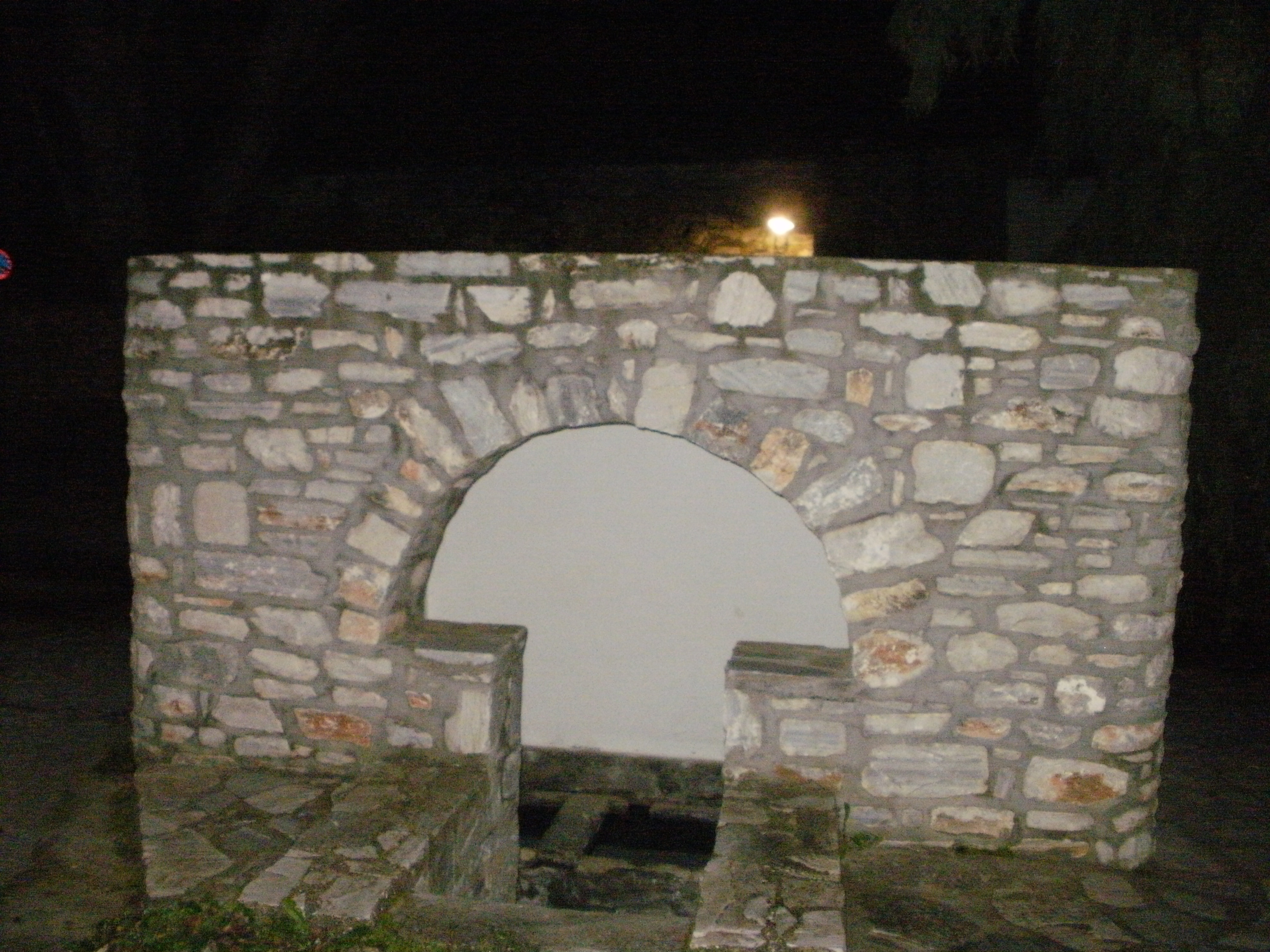 Το πηγαδούλι στο Χαλκί